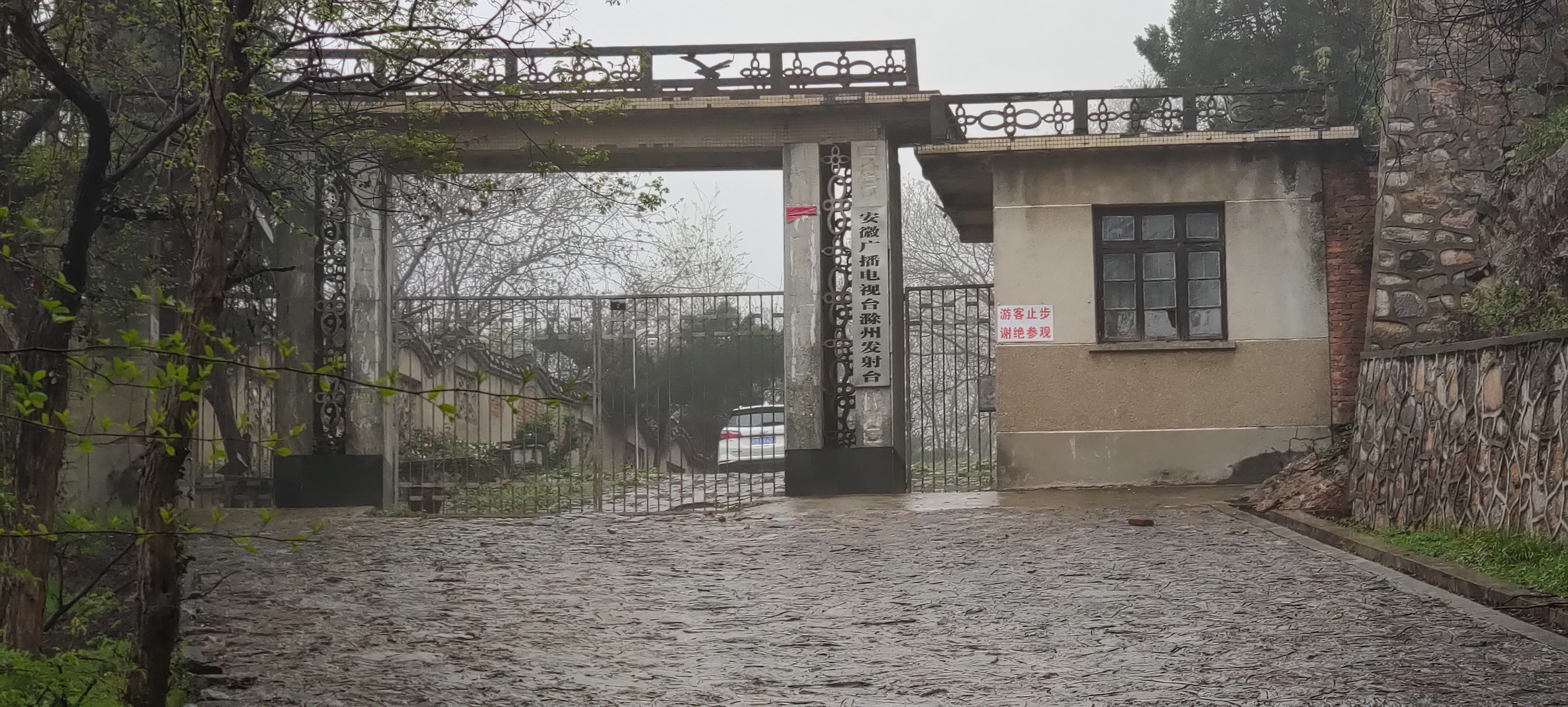 中文（中国大陆）: 安徽广播电视台滁州发射台